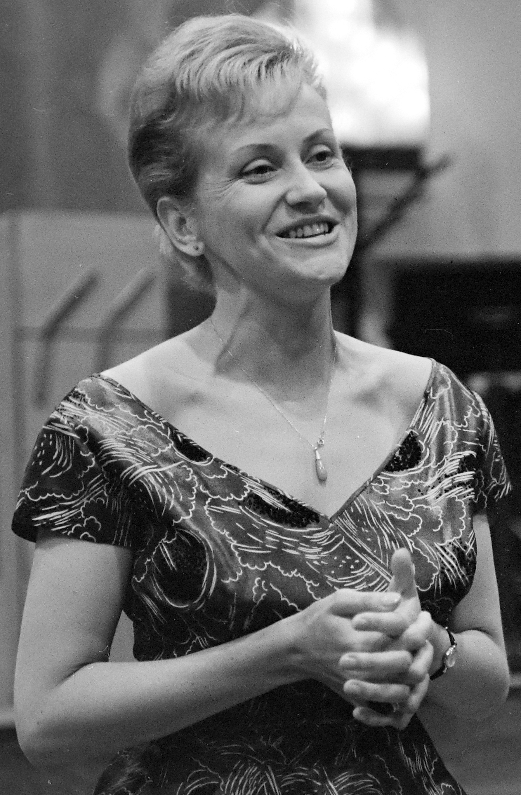 Lehoczky Éva magyar operaénekesnő.